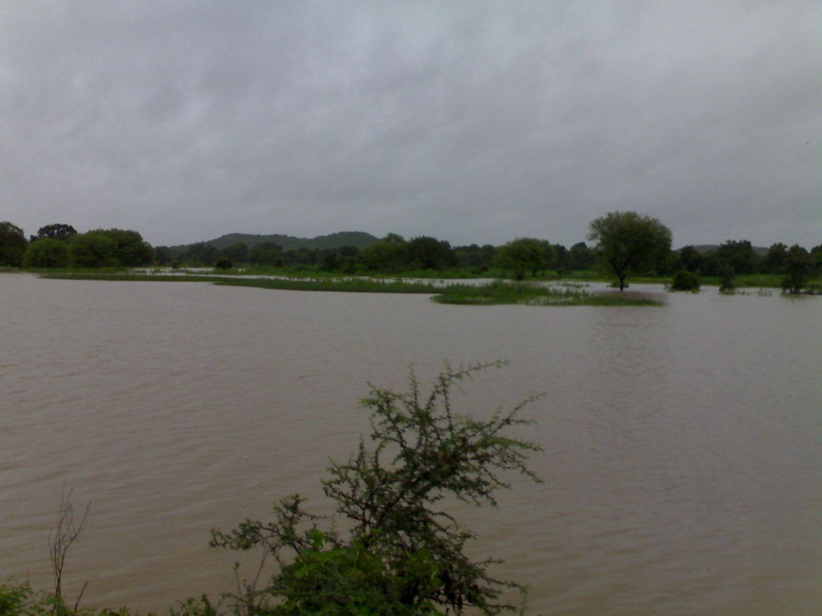 యానంపల్లిలో చెరువు